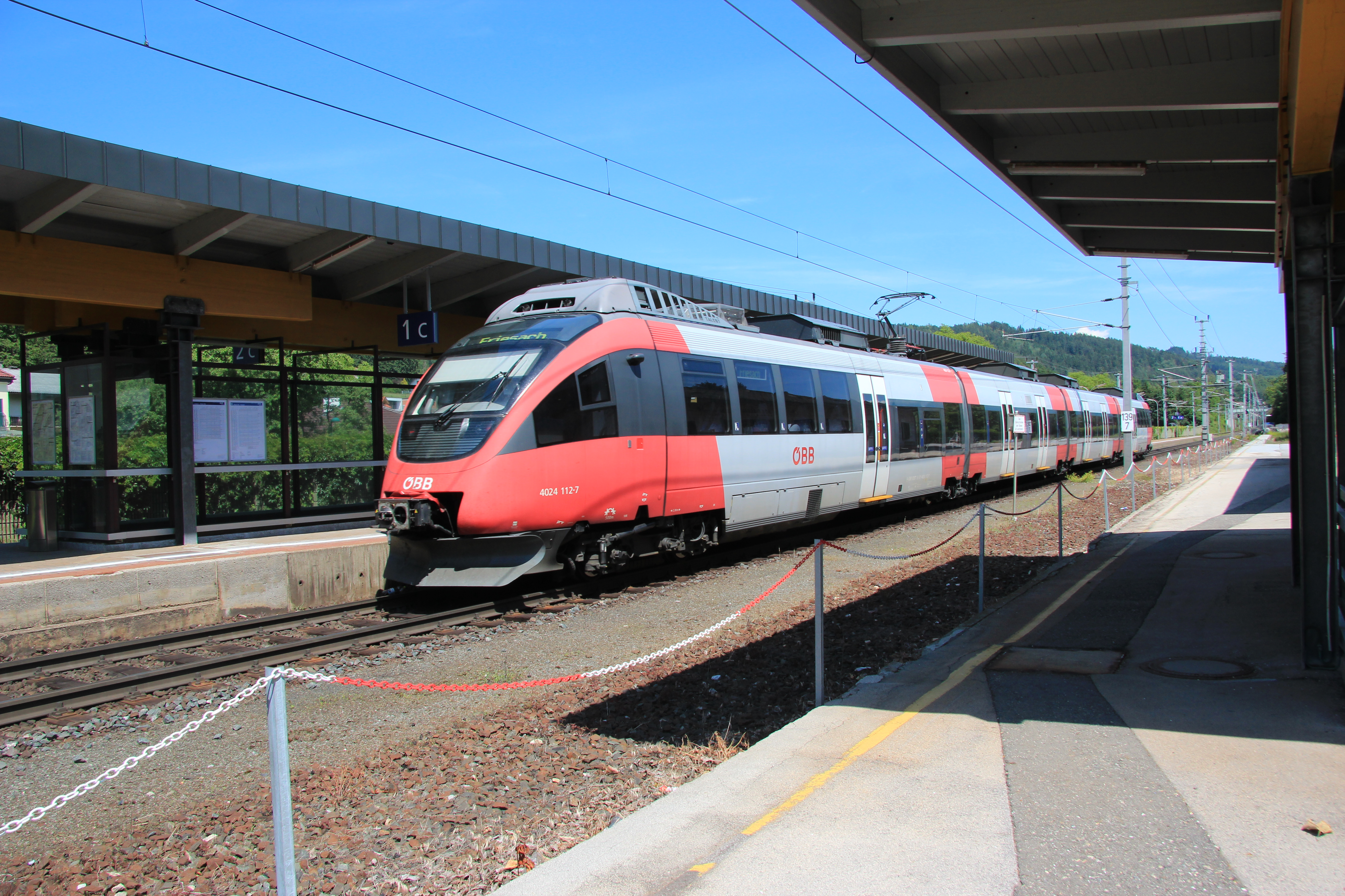 Talent am Bahnhof Pörtschach am Wörther See